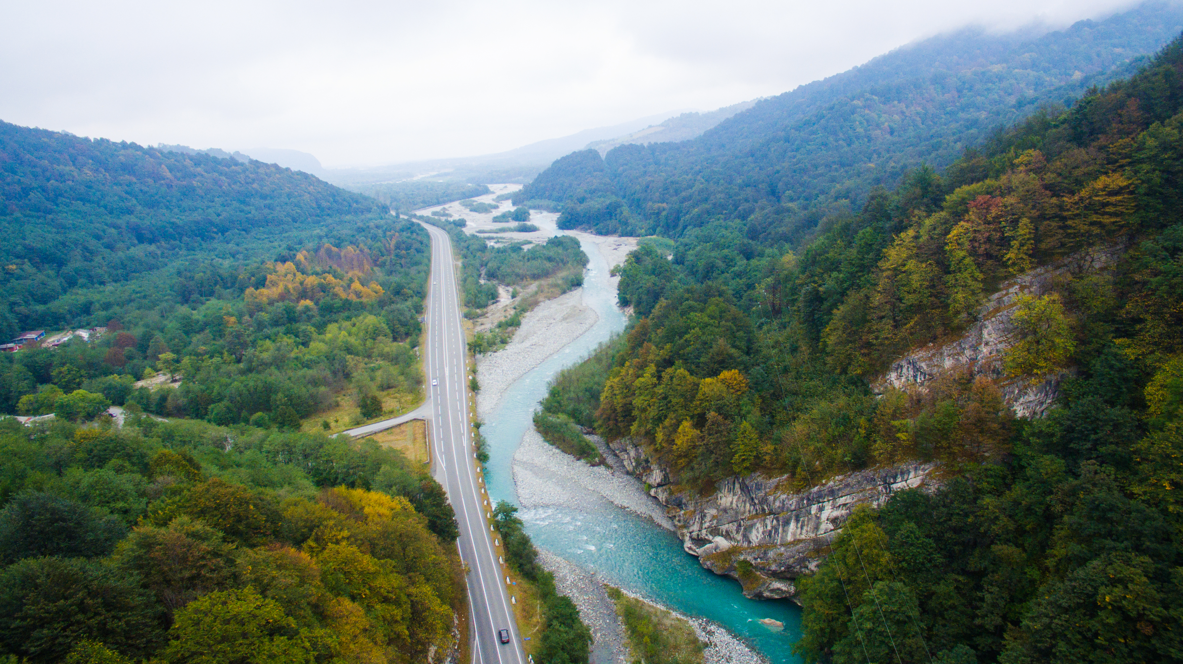 Федеральная автомобильная дорога А-155 «Транскам», 29 км (Республика Северная Осетия)